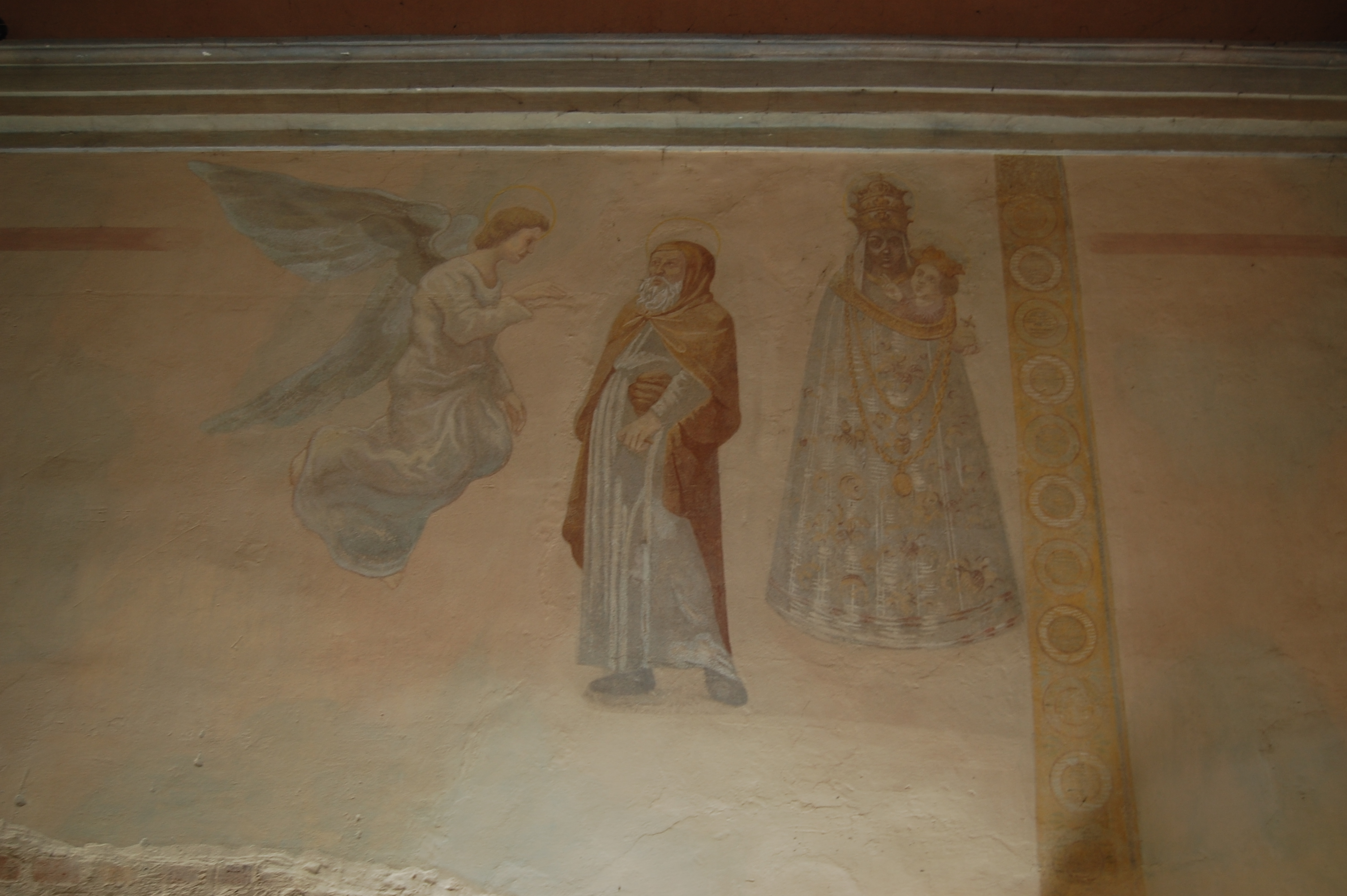 Zdobienia domku loretańskiego we wsi Gołąb w woj. lubelskim.